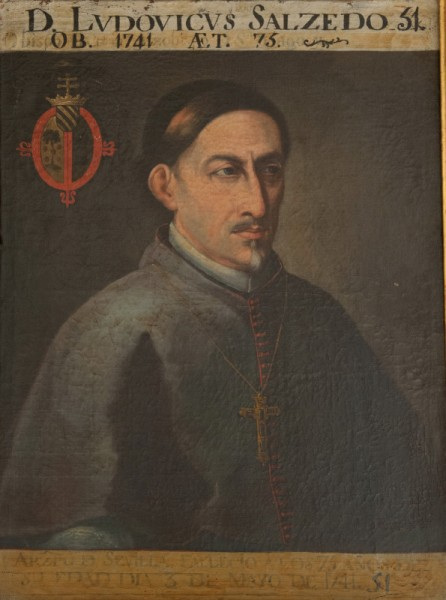 Retrato del eclesiástico español Luis de Salcedo y Azcona (1667-1741), que llegó a ser obispo de Coria y arzobispo de Santiago de Compostela y de Sevilla.